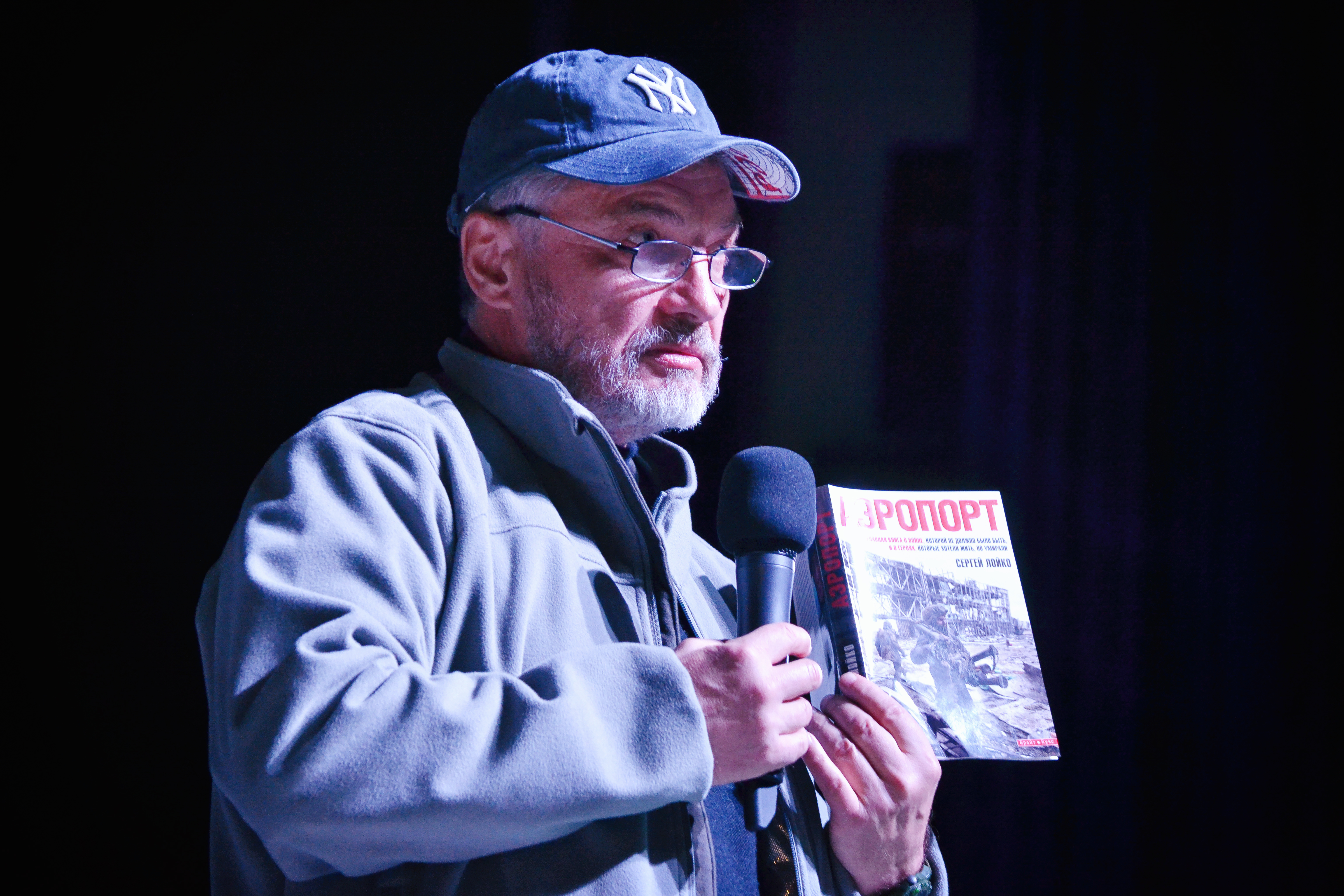 Сергій Лойко у залі Юність у Миколаєві презентує книгу "Аеропорт"